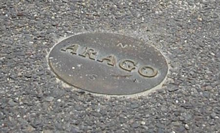 méridien matérialisant le méridien de Paris au parc Montsouris, Paris, France